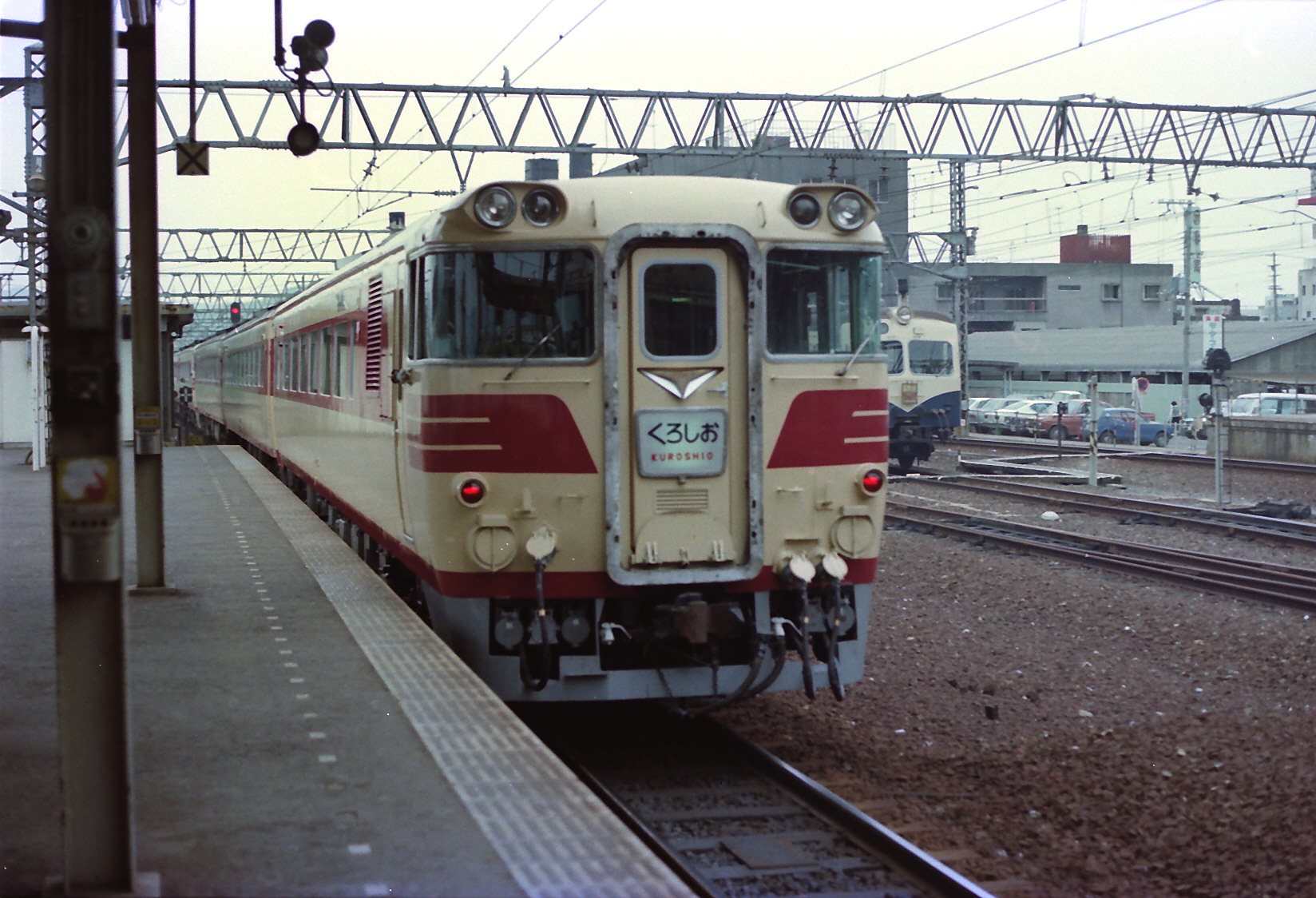 和歌山駅 特急 くろしお